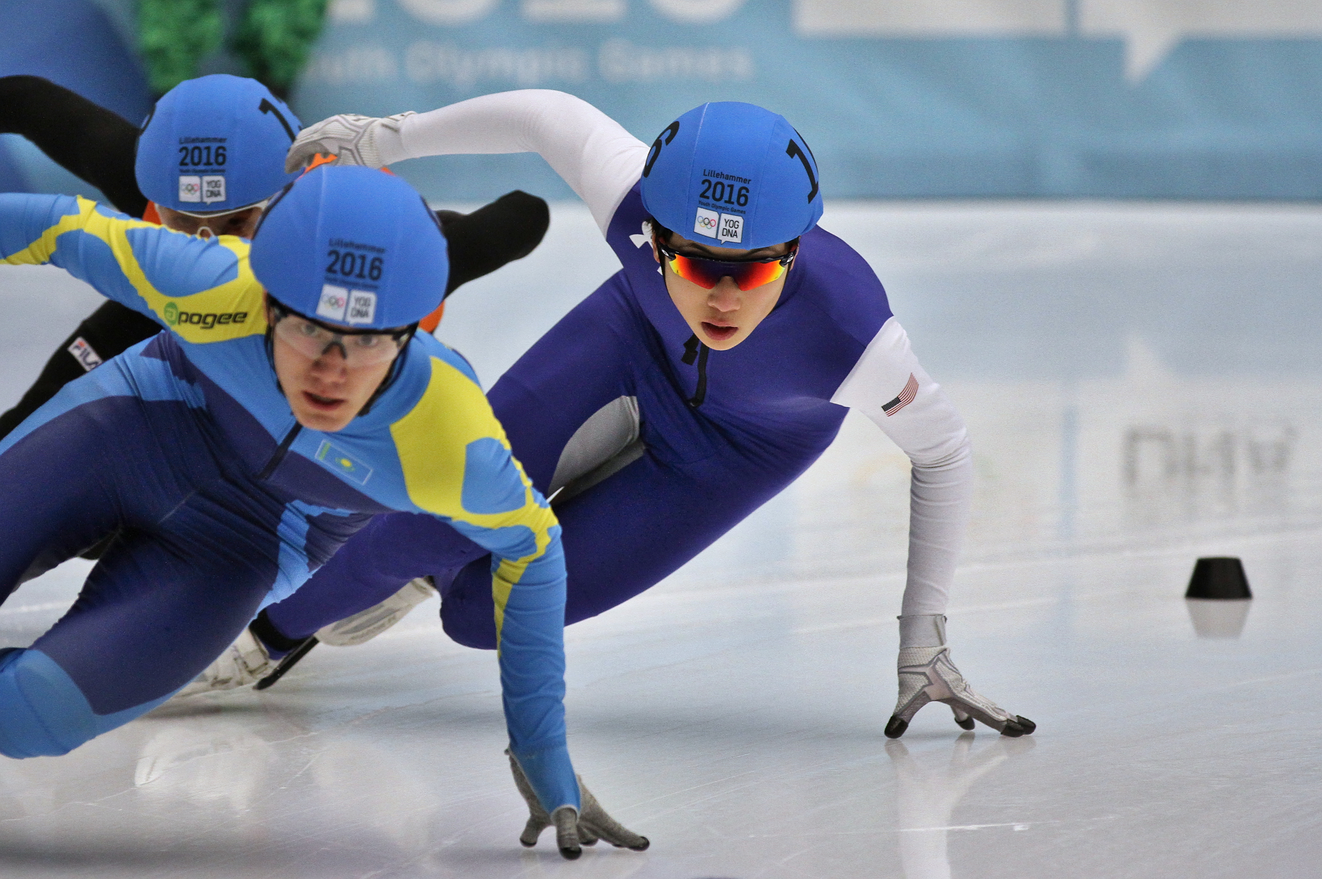 Lillehammer 2016 - Short track 1000m - Men Finals - Tjerk De Boer, Yerkebulan Shamukhanov and Aaron Heo